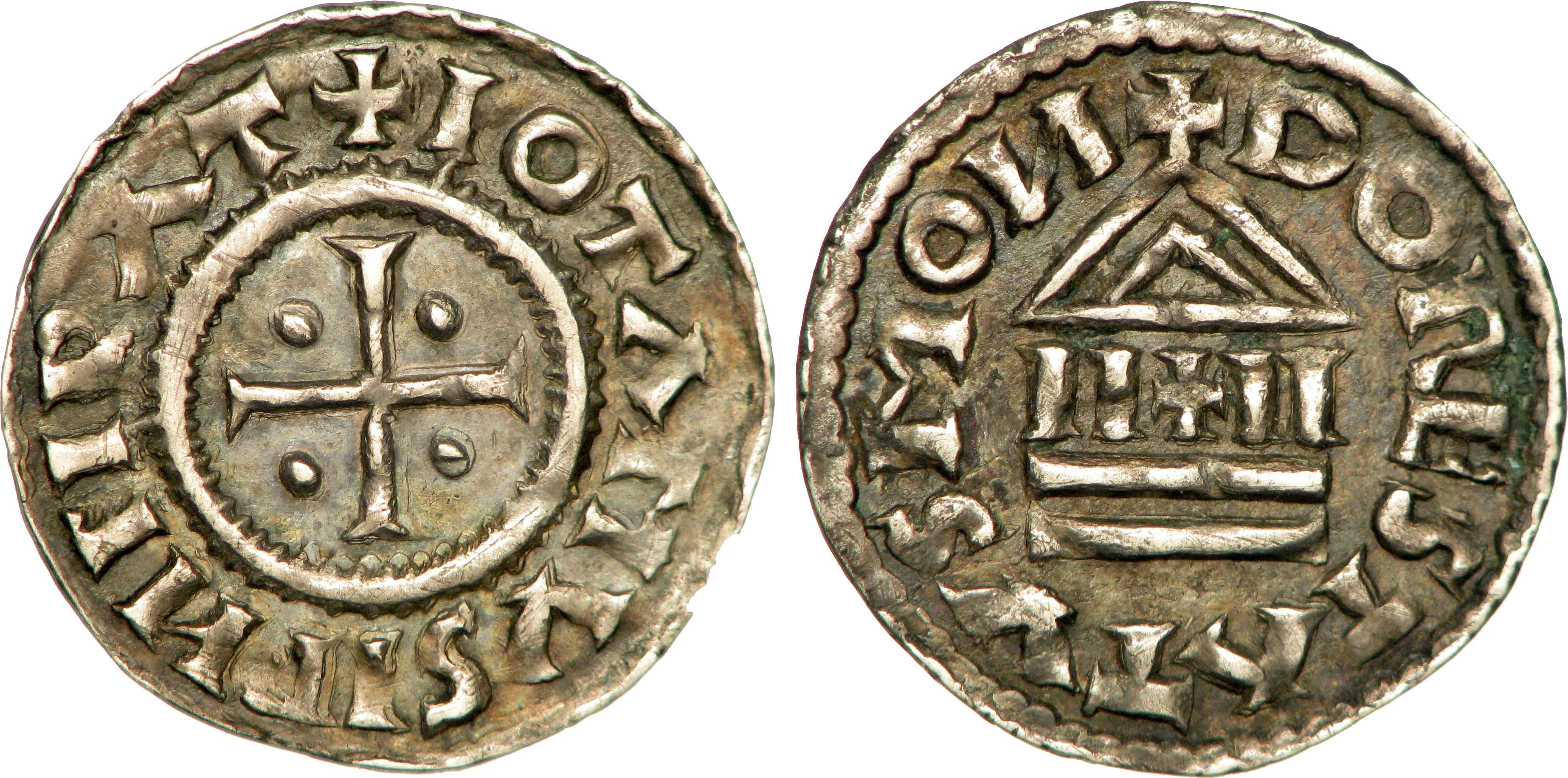 Nom de l'atelier/ville : Dorestadt Métal : argent Diamètre : 20,5mm Axe des coins : 12h. Poids : 1,49g. Degré de rareté : R1 Titulature avers : + IOTANVS ILNPIRAT. Description avers : Croix cantonnée de quatre points. Traduction avers : (Lothaire, empereur). Titulature revers : + DORESTATVS MON, (N rétograde). Description revers : Temple tétrastyle avec un fronton triangulaire sommé d'une croisette coupant la légende en haut, portant en cœur une croisette posée sur deux degrés. Traduction revers : (Monnaie de Dorestadt).